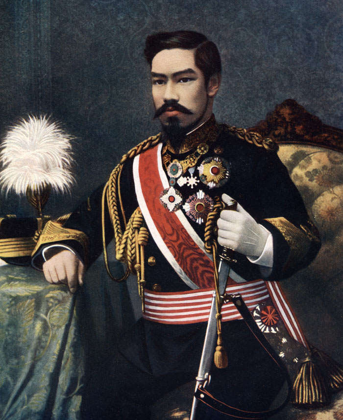 Meiji emperor